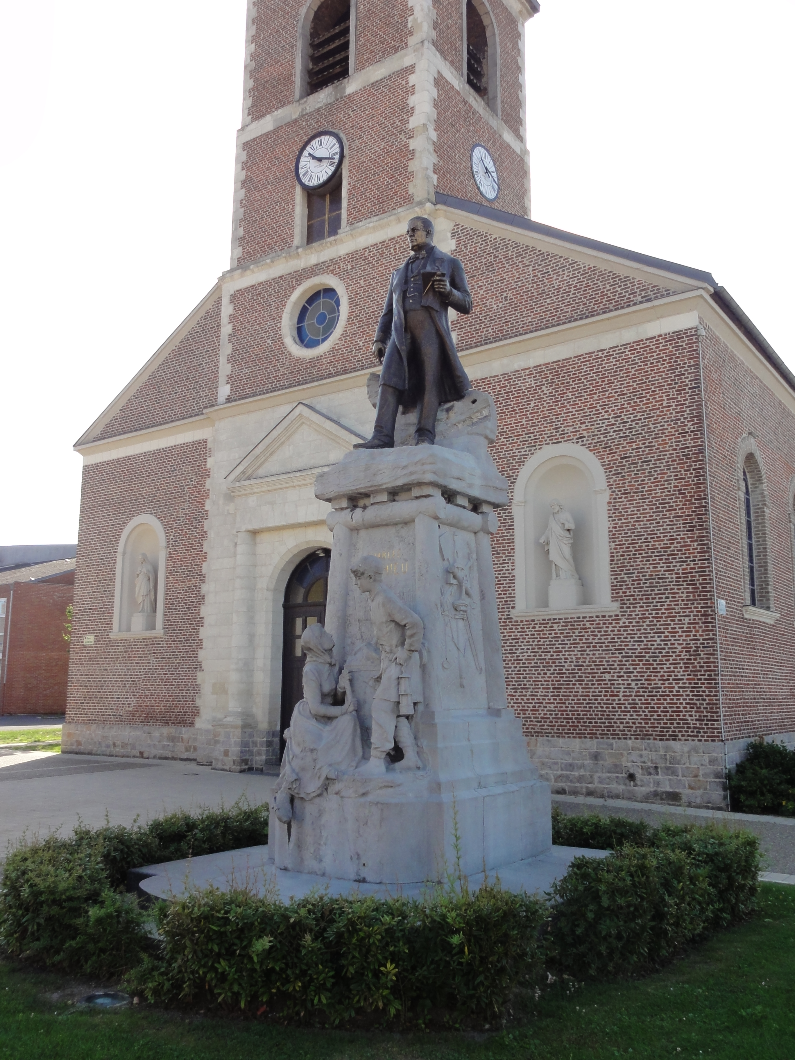 Monument à Charles Mathieu, Compagnie des mines de Douchy, Lourches, Nord, Nord-Pas-de-Calais, France. .